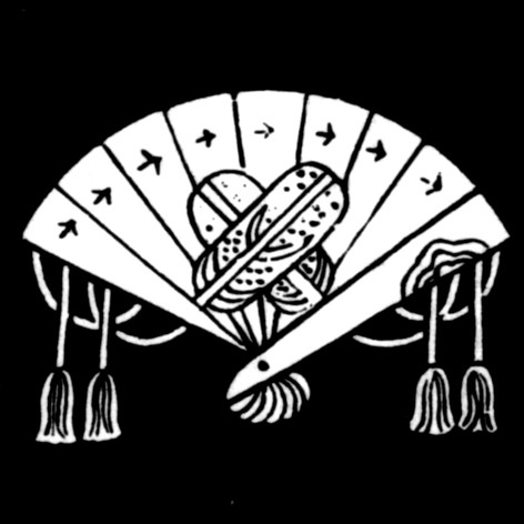 檜扇に鷲の羽